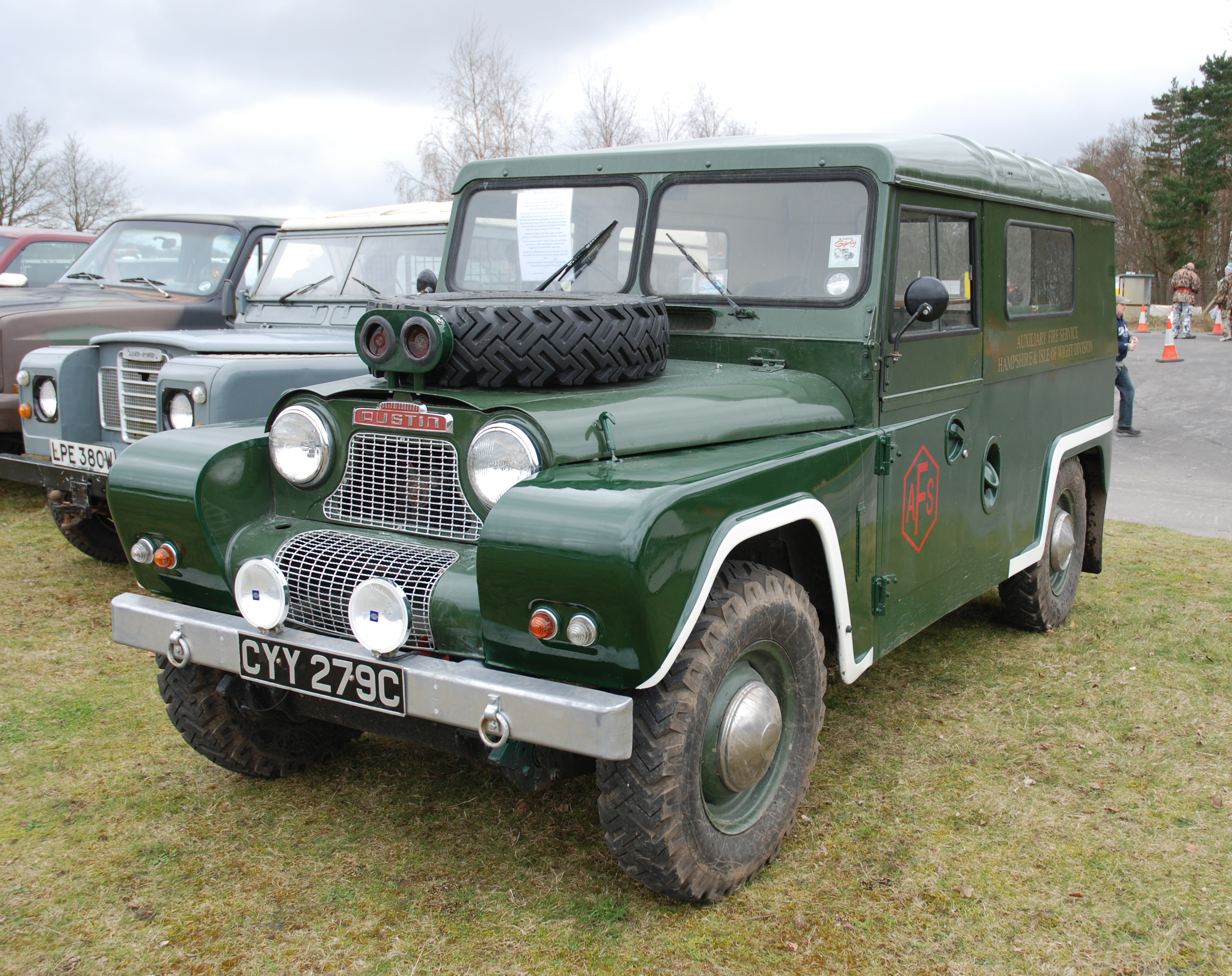 Wheels Day 2010